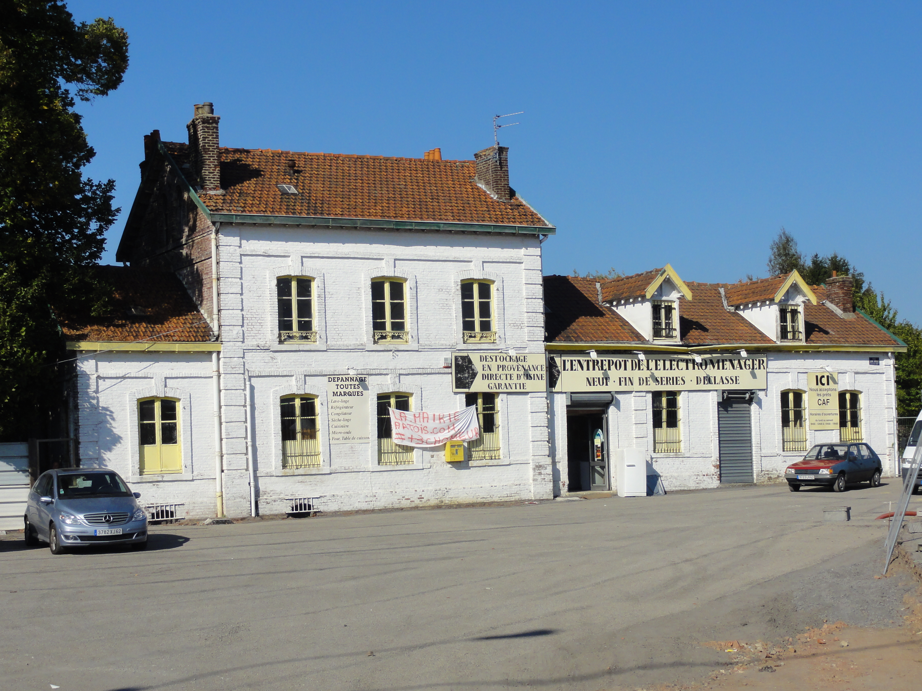 Gare de Bruay-en-Artois sur la ligne de Bully - Grenay à Brias, Compagnie des mines de Bruay, bassin minier du Nord-Pas-de-Calais, Bruay-la-Buissière, Pas-de-Calais, Nord-Pas-de-Calais, France.